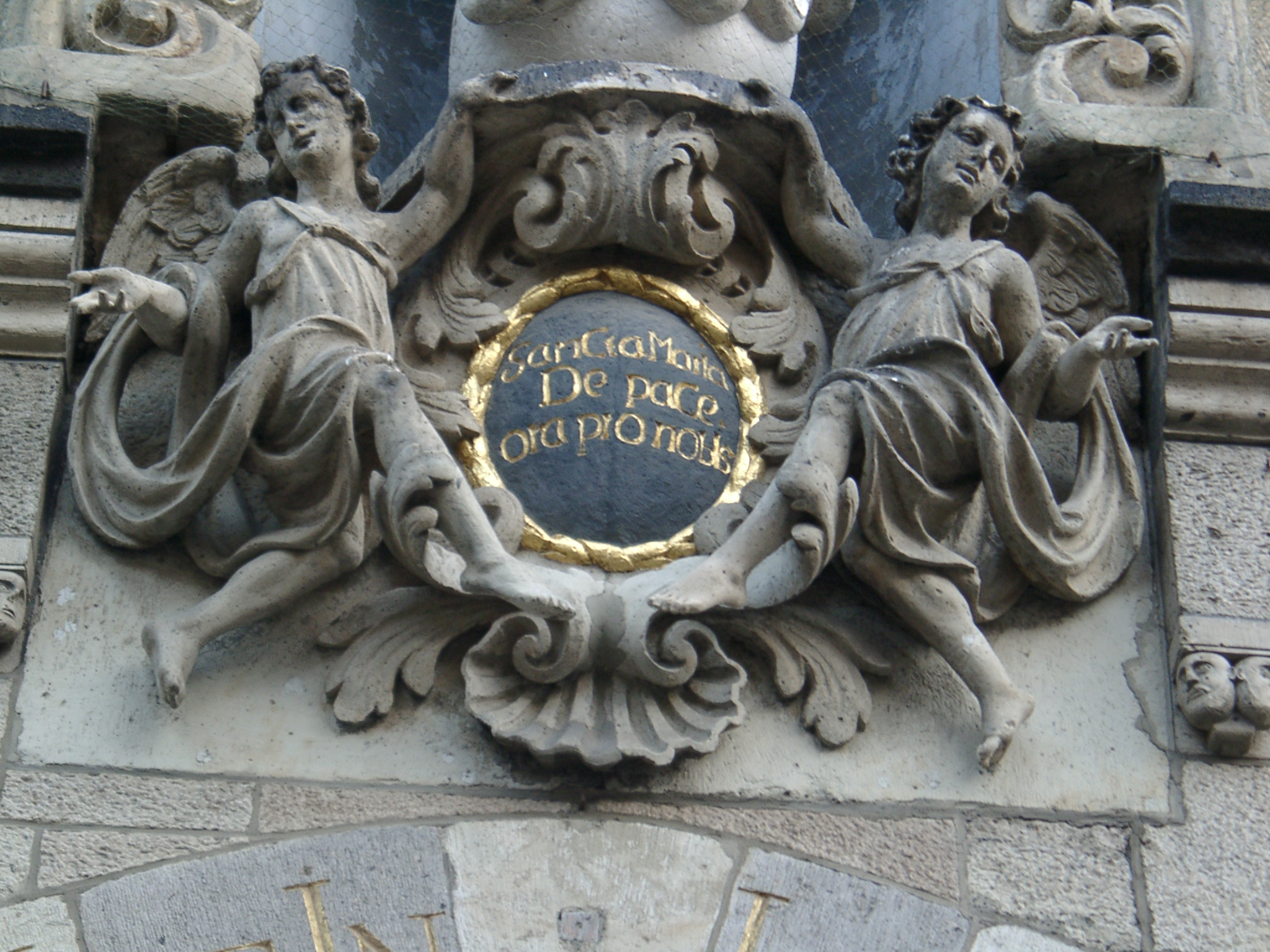 Koblenz Liebfrauenkirche Chronogramm unter Marienfigur